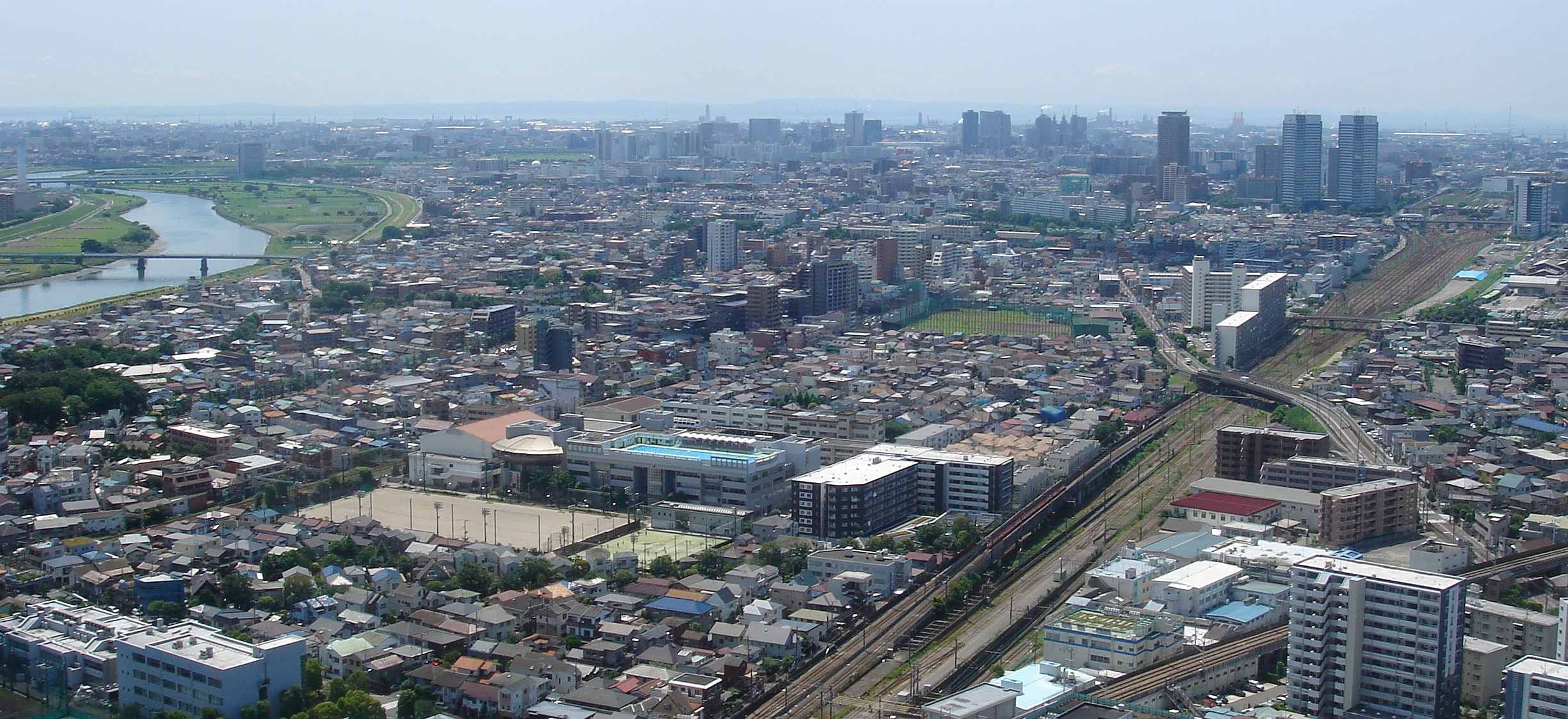 Kawasaki City